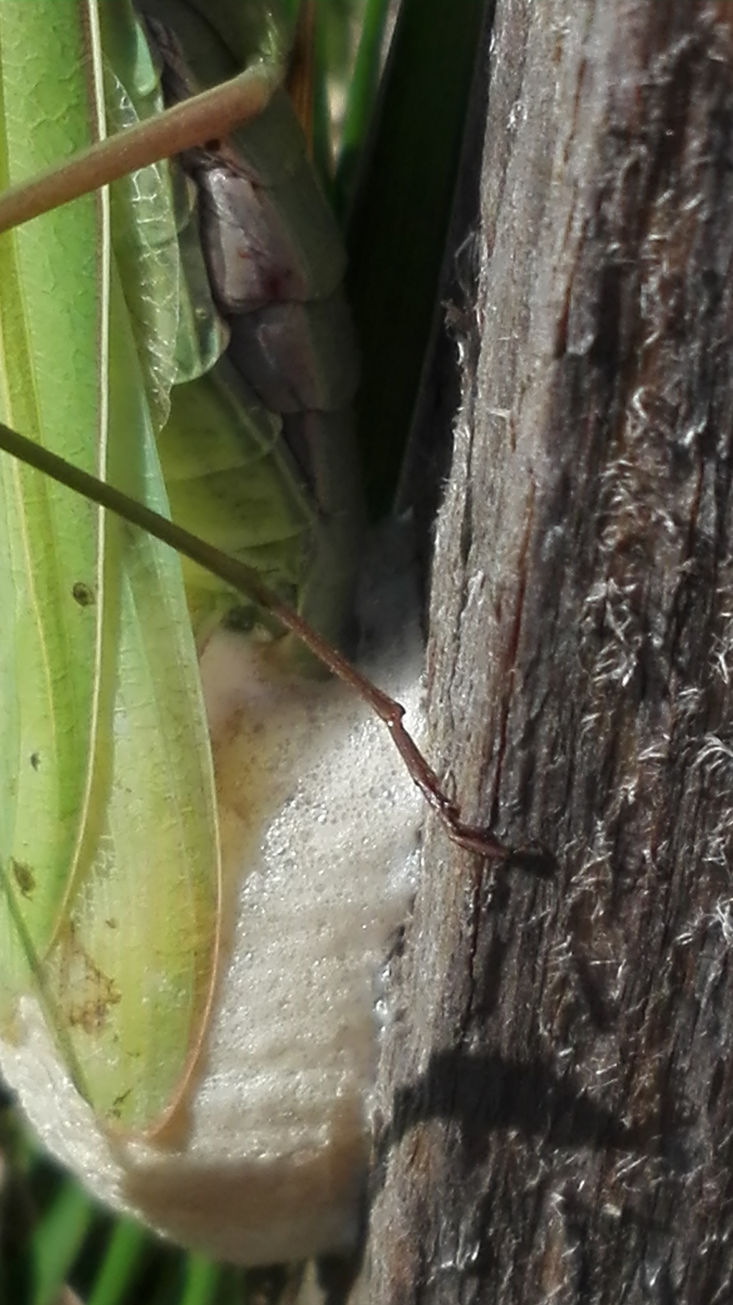 Mantis religios (Imádkozó sáska peterakás közben, közeli)